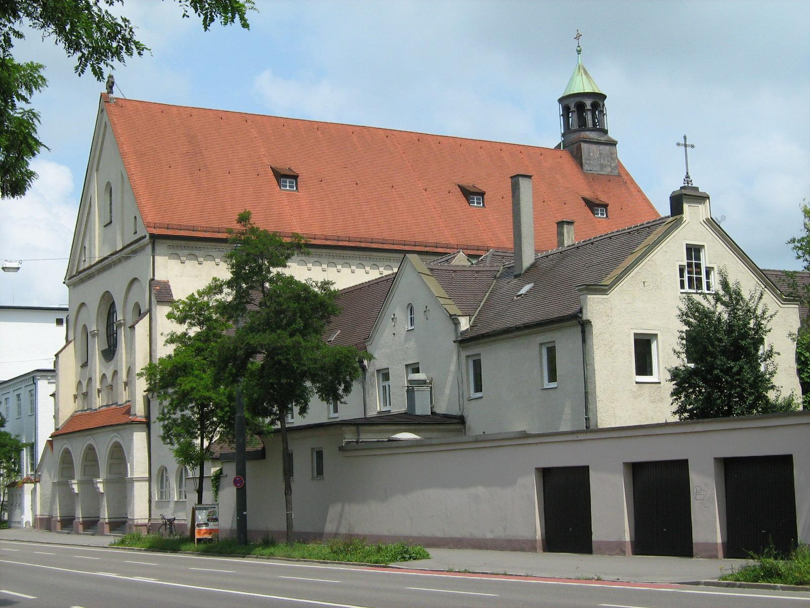 Ehemaliges Kapuziner-Kloster Sankt Sebastian Augsburg (Franziskanisches Zentrum St. Sebastian) - Halbinsel im MAN-Firmengelände